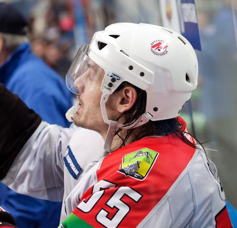 Защитник новокузнецкого «Металлурга» Брент Сопел во время матча чемпионата КХЛ против хабаровского «Амура» 6 февраля 2012 года.